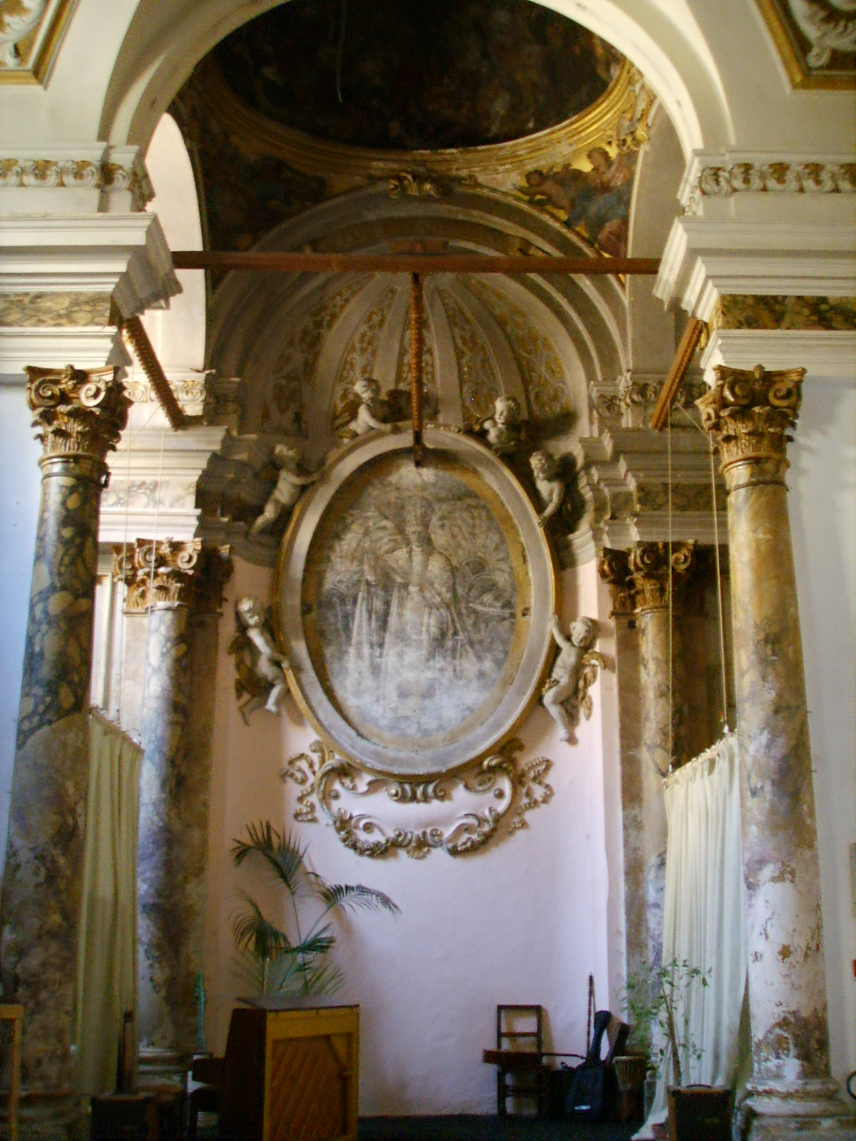 San Francesco de' Macci, interno